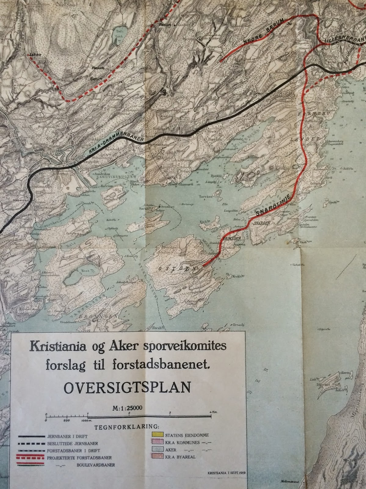 'Forstadsbanenetet', forslag på utforming fra Kristiania og Aker sporveikomite i 1919